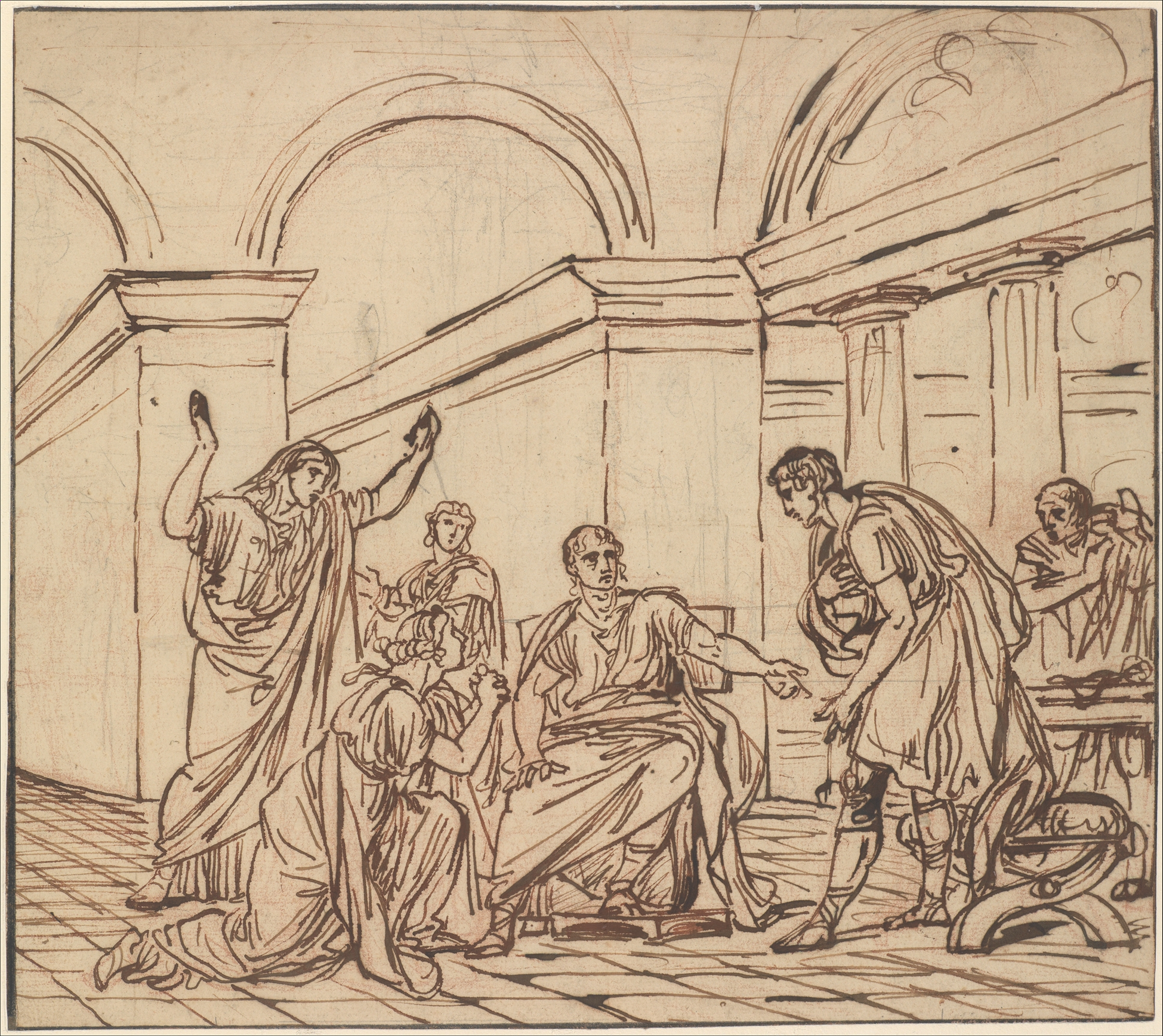 Drawing; Drawings